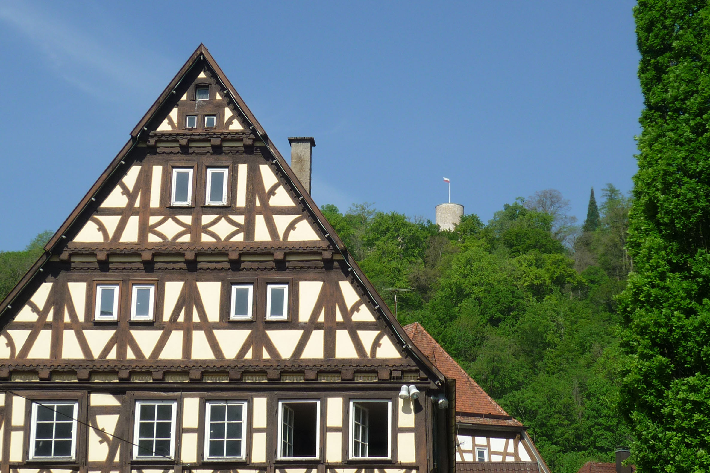 Marktstraße in Nagold, Lkr. Calw (Württemberg) mit Blick zur Burg Hohennagold